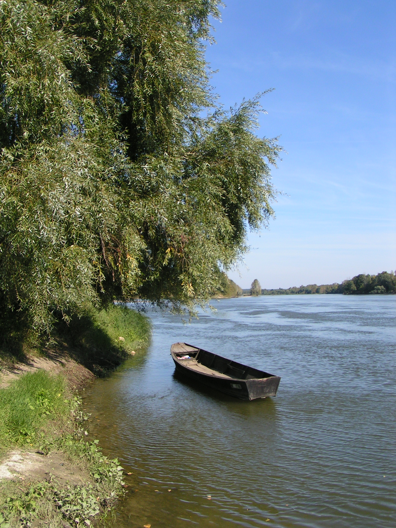 Vue des bords Loire à La Riche (37520)